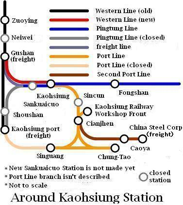 臺灣鐵路管理局高雄車站附近軌道示意圖，使用Microsoft Visio繪製。未列出臨港線支線，未依實際距離繪製。